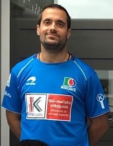 2018ko Lau eta Erdiko txapelketaren aurkezpenean pilotari guztiak